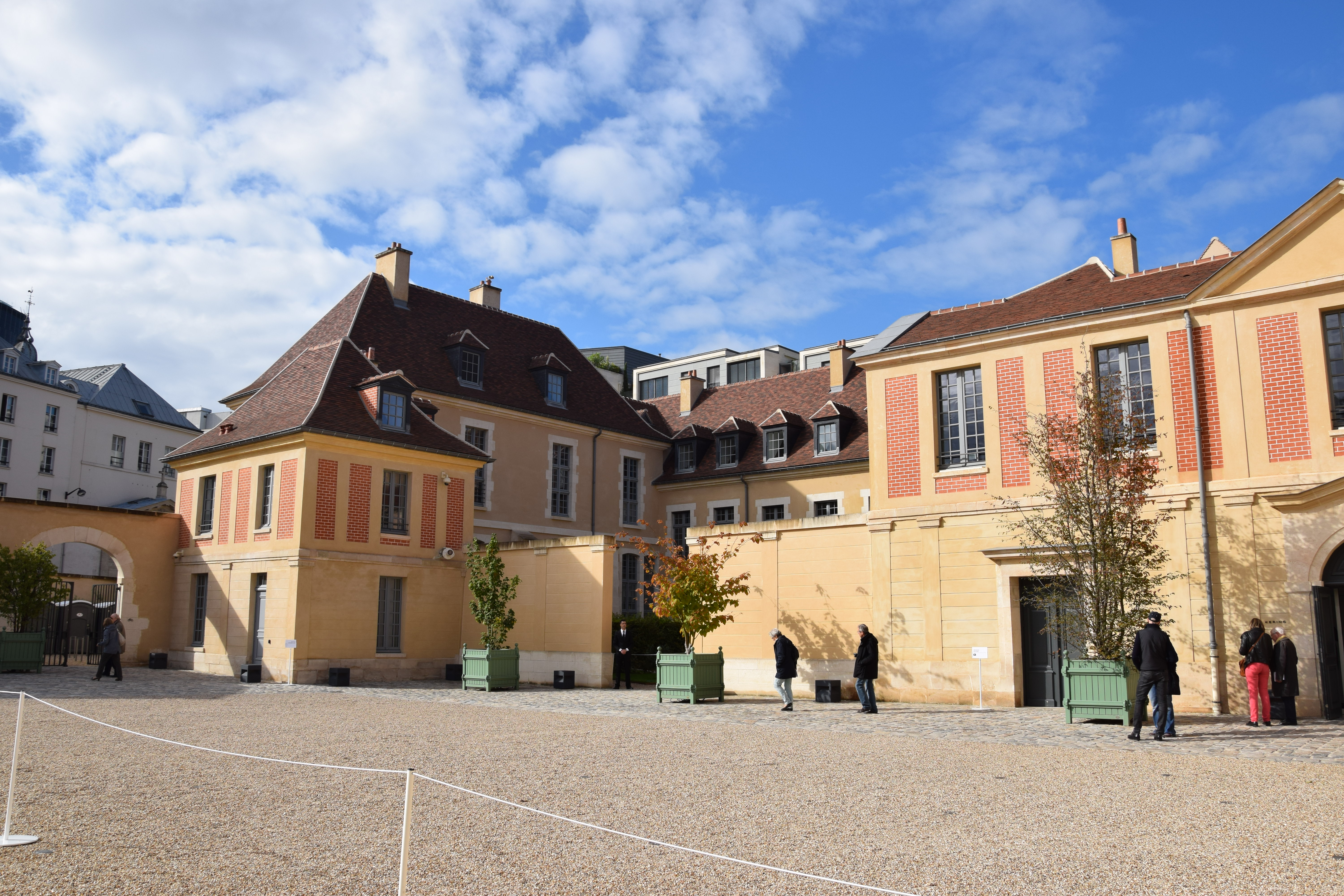 Hôpital Laennec de Paris